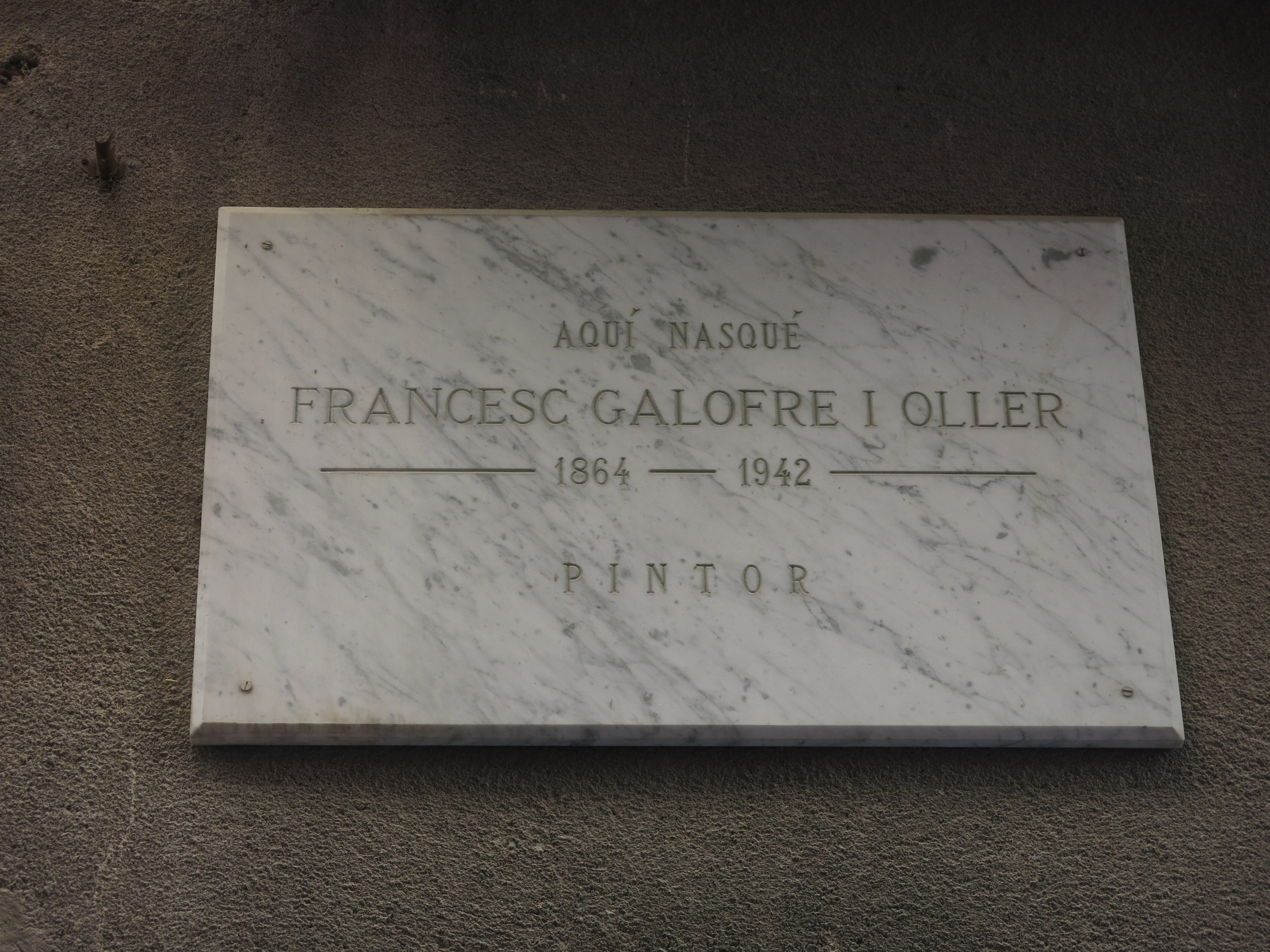 Carrer de l'Església (Valls)